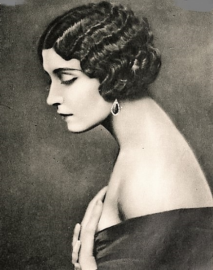 Helena D'Algy